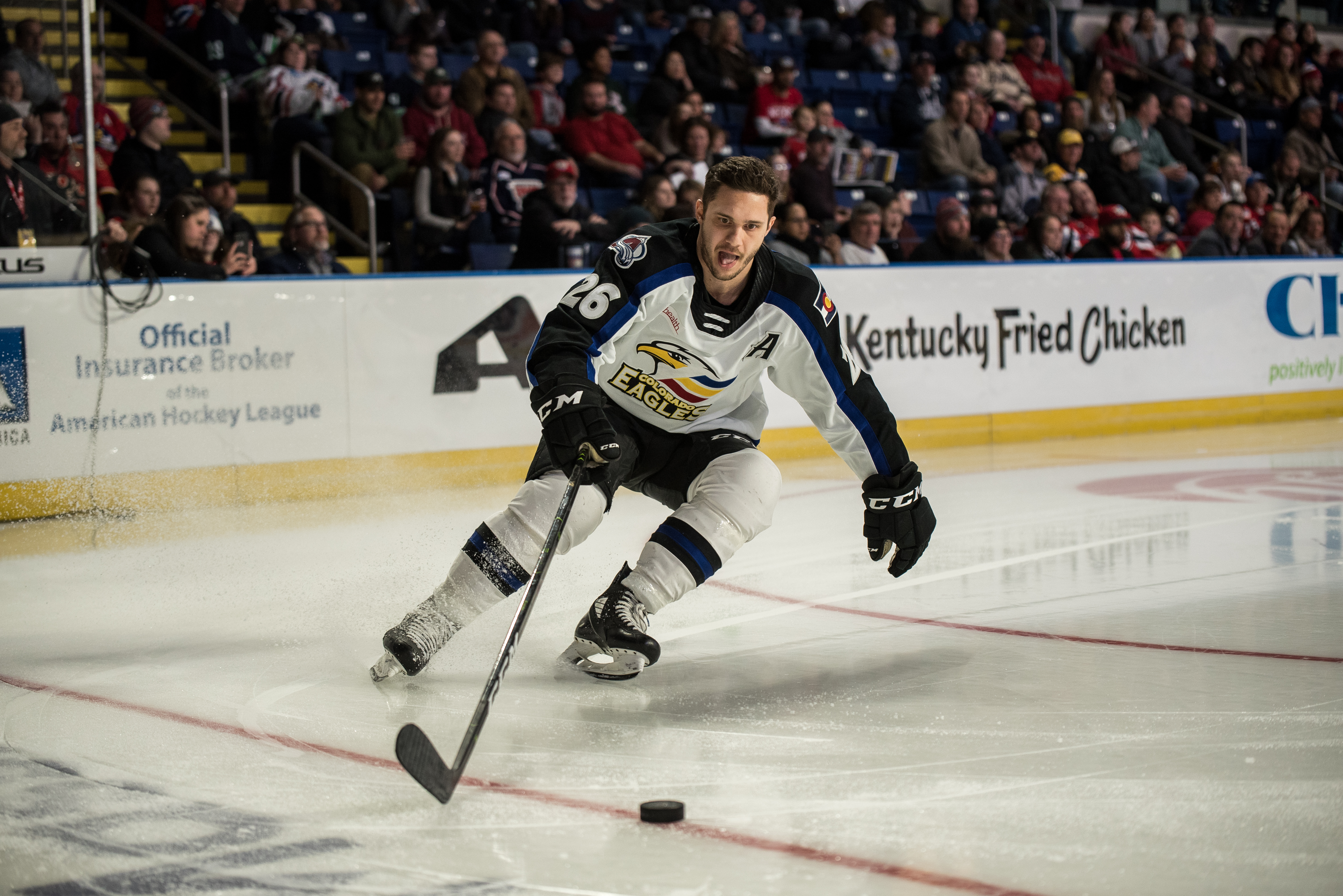 CYW_1225